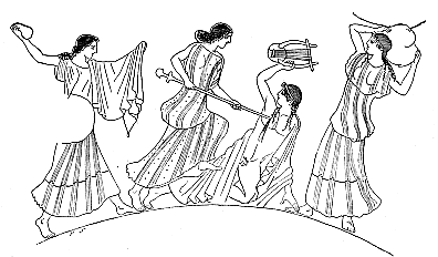 « vase de Nola, le héros renversé lève aussi sa lyre en l'air ; une Ménade le transperce de son thyrse ; deux autres se préparent à le lapider.»